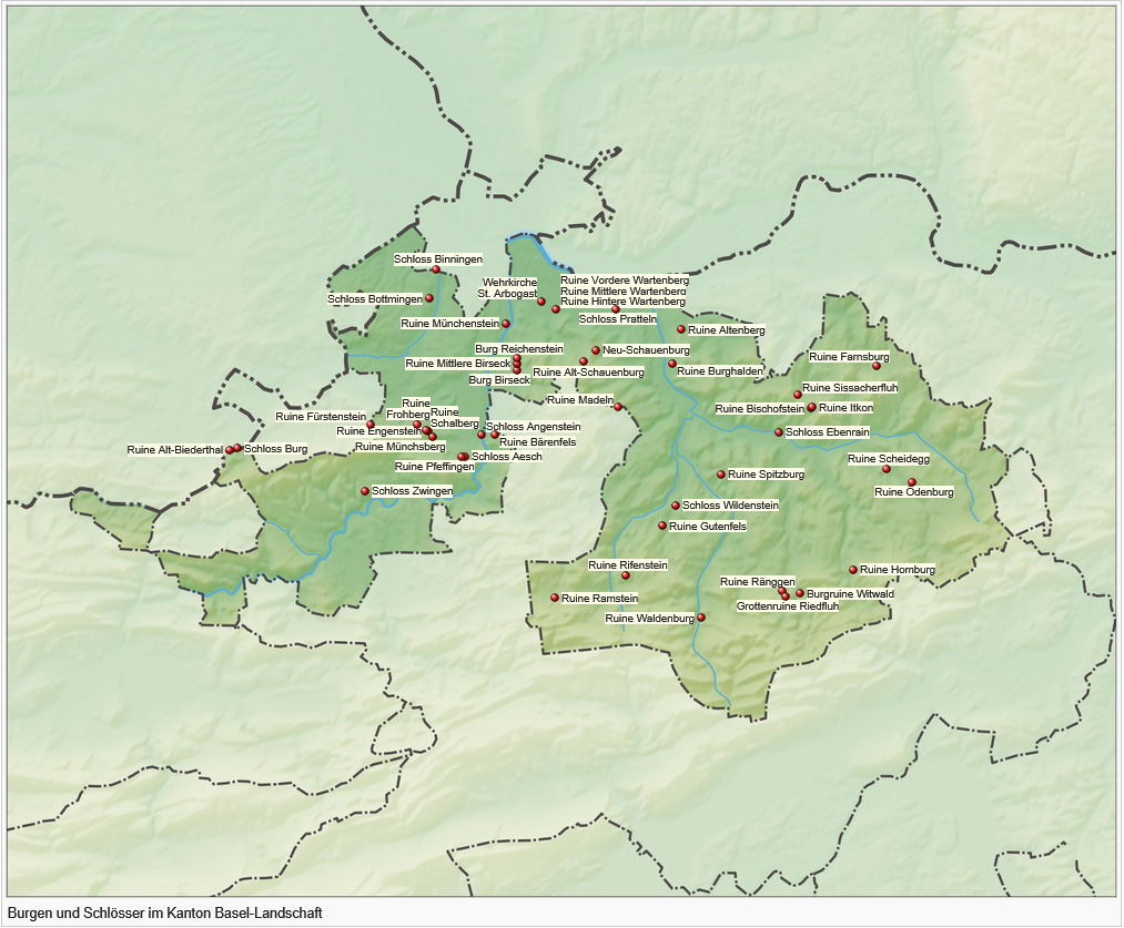 Karte der Burgen und Schlösser im Kanton Basel-Landschaft